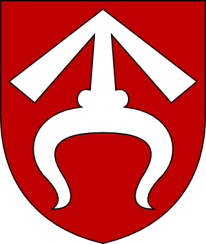 znak biskupa Tobiáše z Bechyně